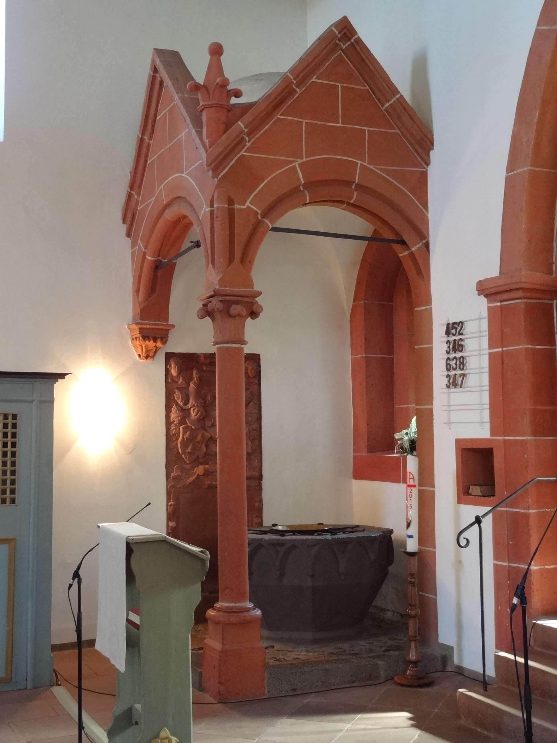 Evangelische Pfarrkirche Münzenberg